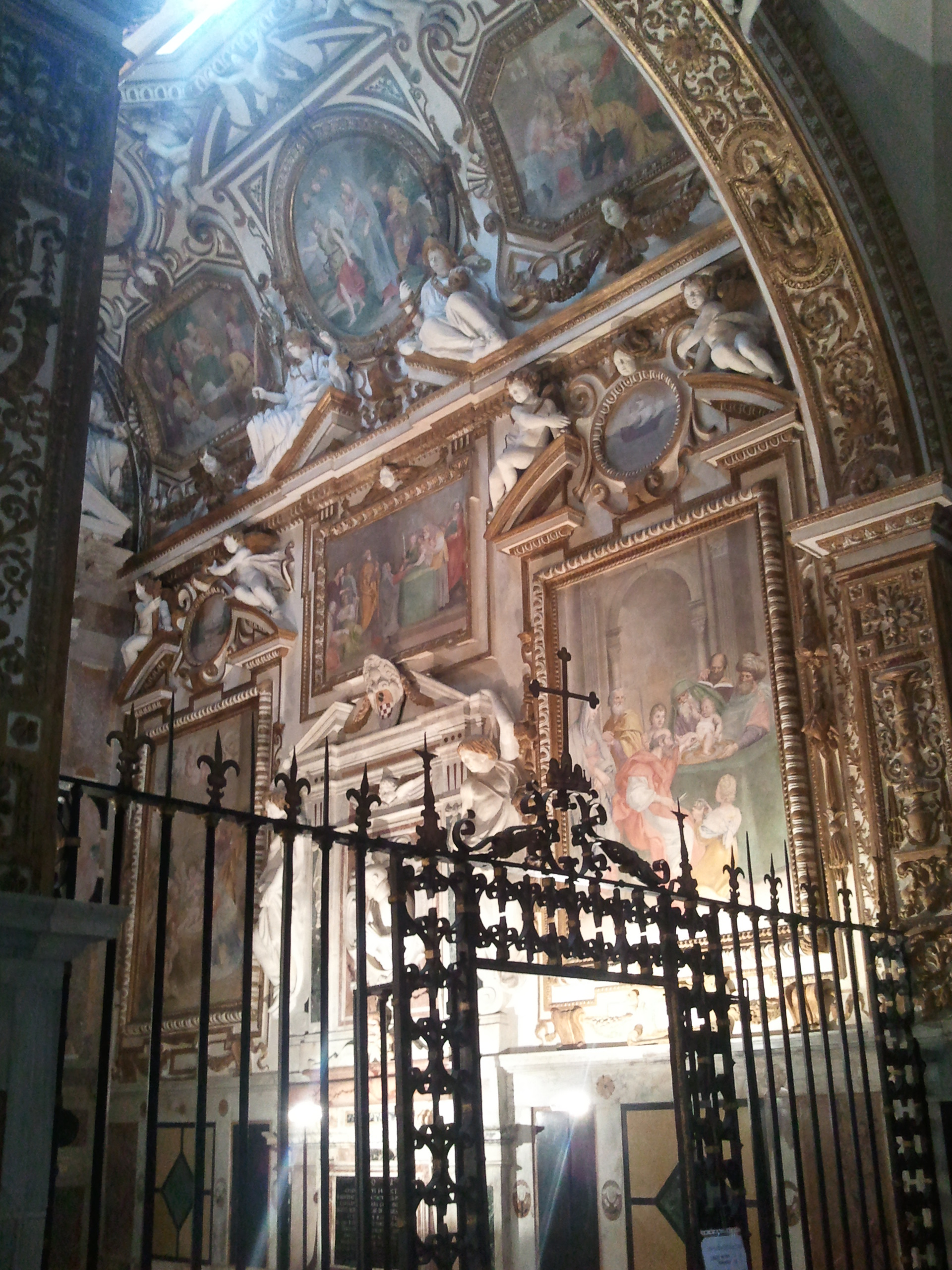 Duomo di Fano, Cappella Nolfi, XVII secolo